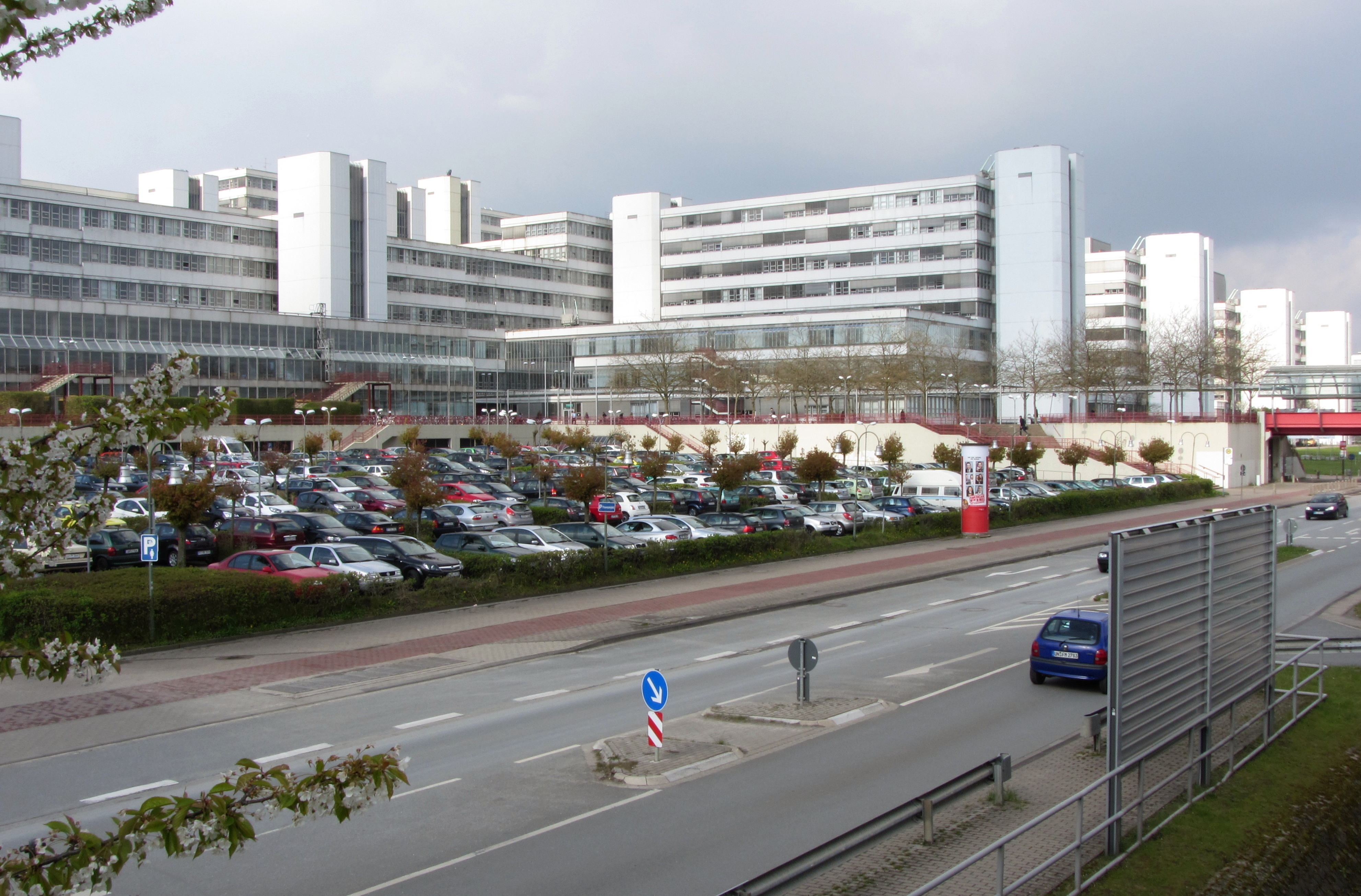 Bielefeld. Hauptgebäude der Universität, links Gebäudeteile A-B mit Mensa. Der vorgebaute 2-geschossige Teil soll nach Fertigstellung der neuen Mensa im Herbst 2013 abgerissen und durch einen Neubau ersetzt werden.